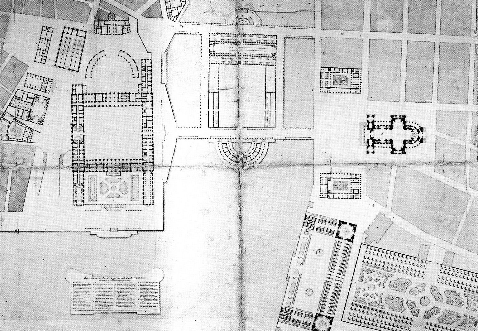 Förslag till generalplan över Stockholms centrala delar 1712.